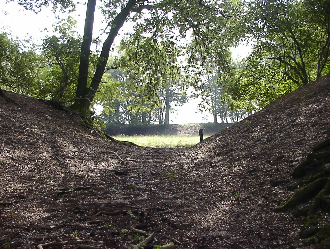 Fossa Eugeniana, entrenchment 6, entry, Kamp-Lintfort